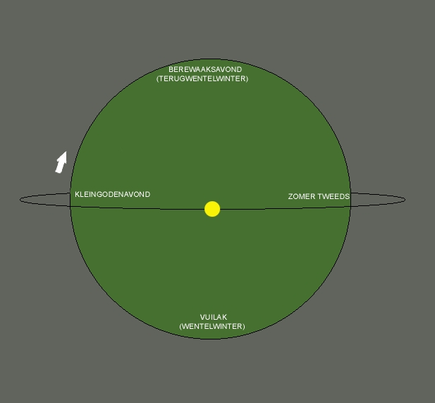 Vereenvoudigde voorstelling van de seizoenen op de Schijfwereld.